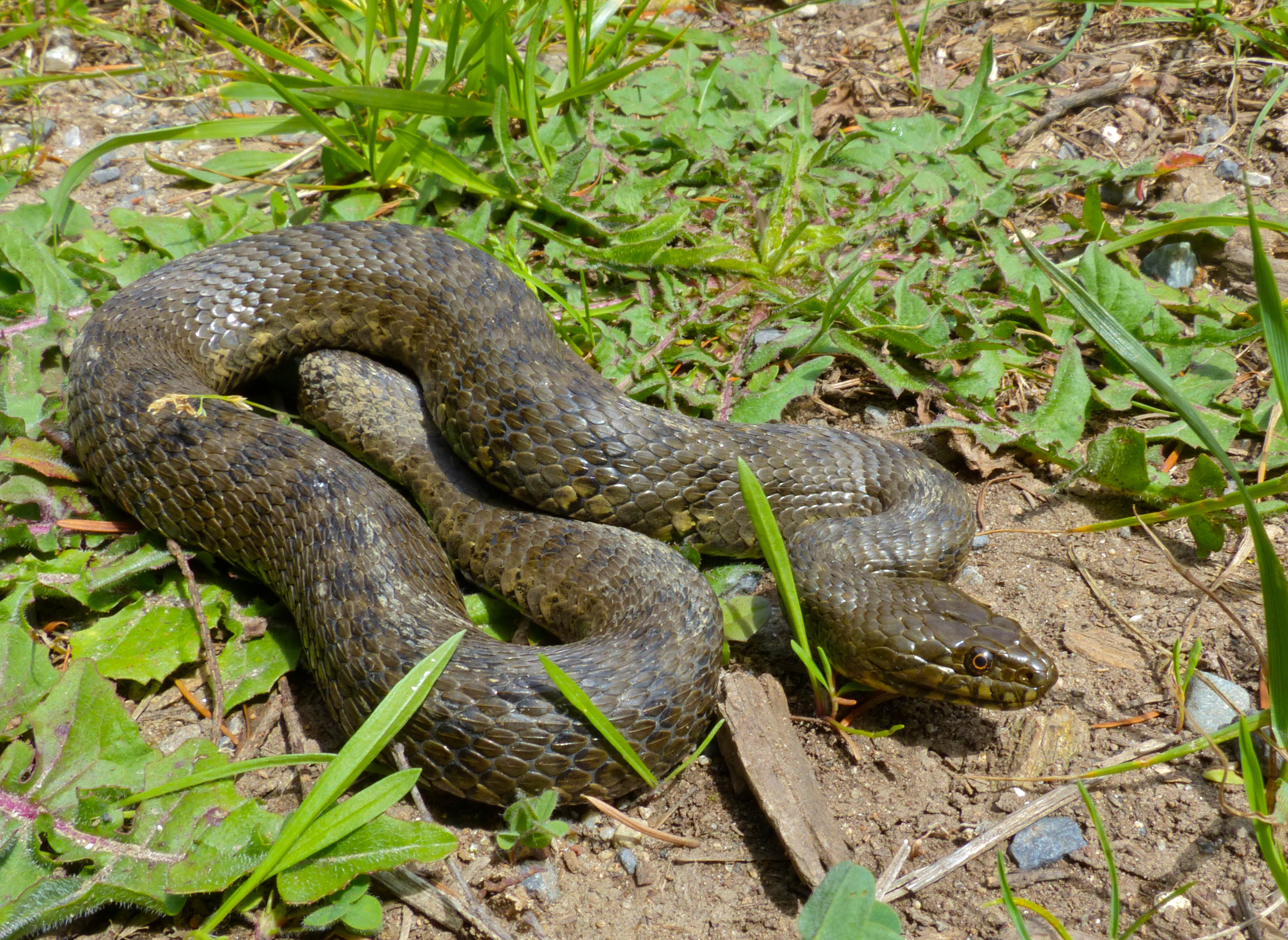 Avène, Hérault, FRANCE